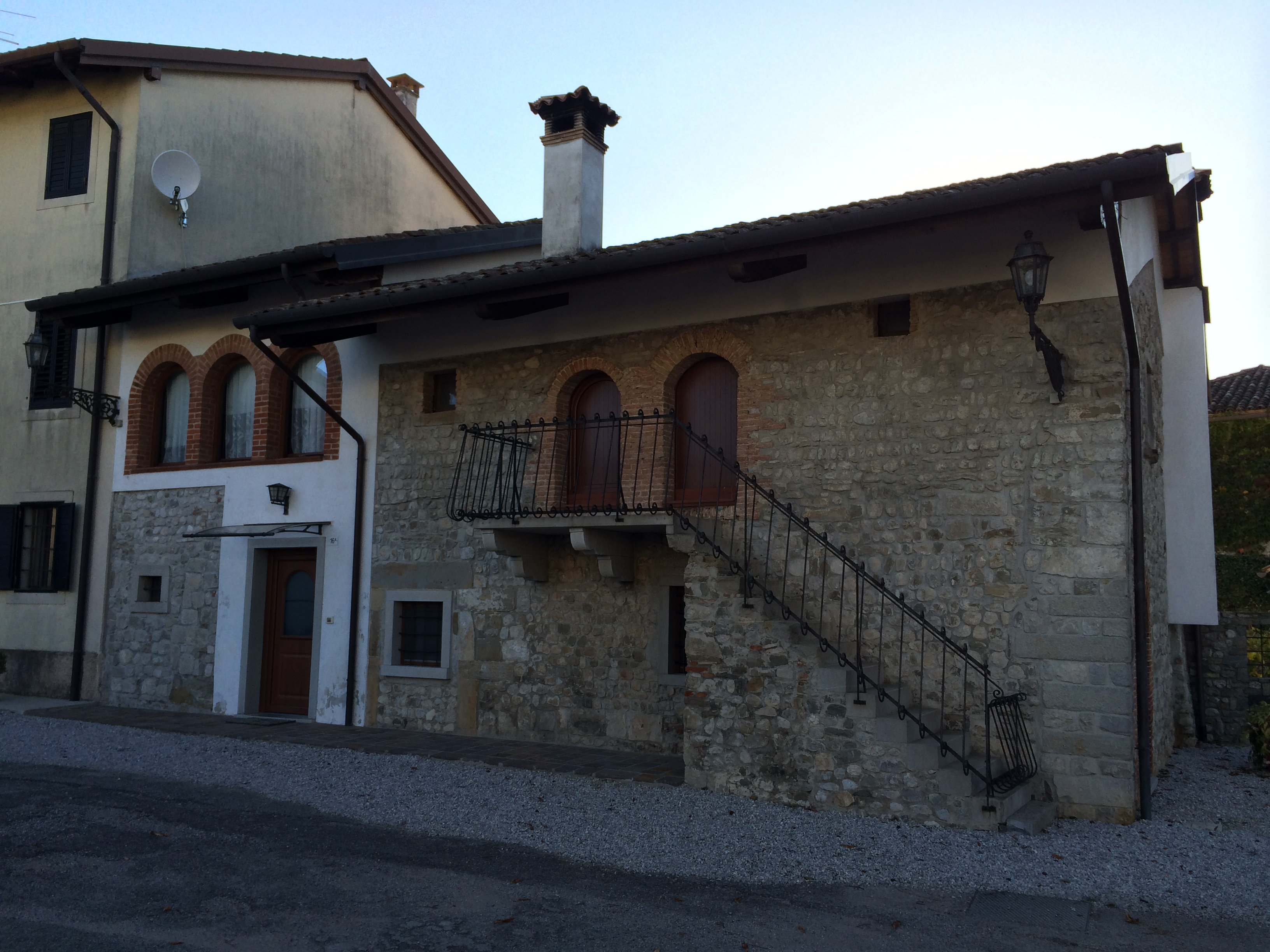 Premariacco